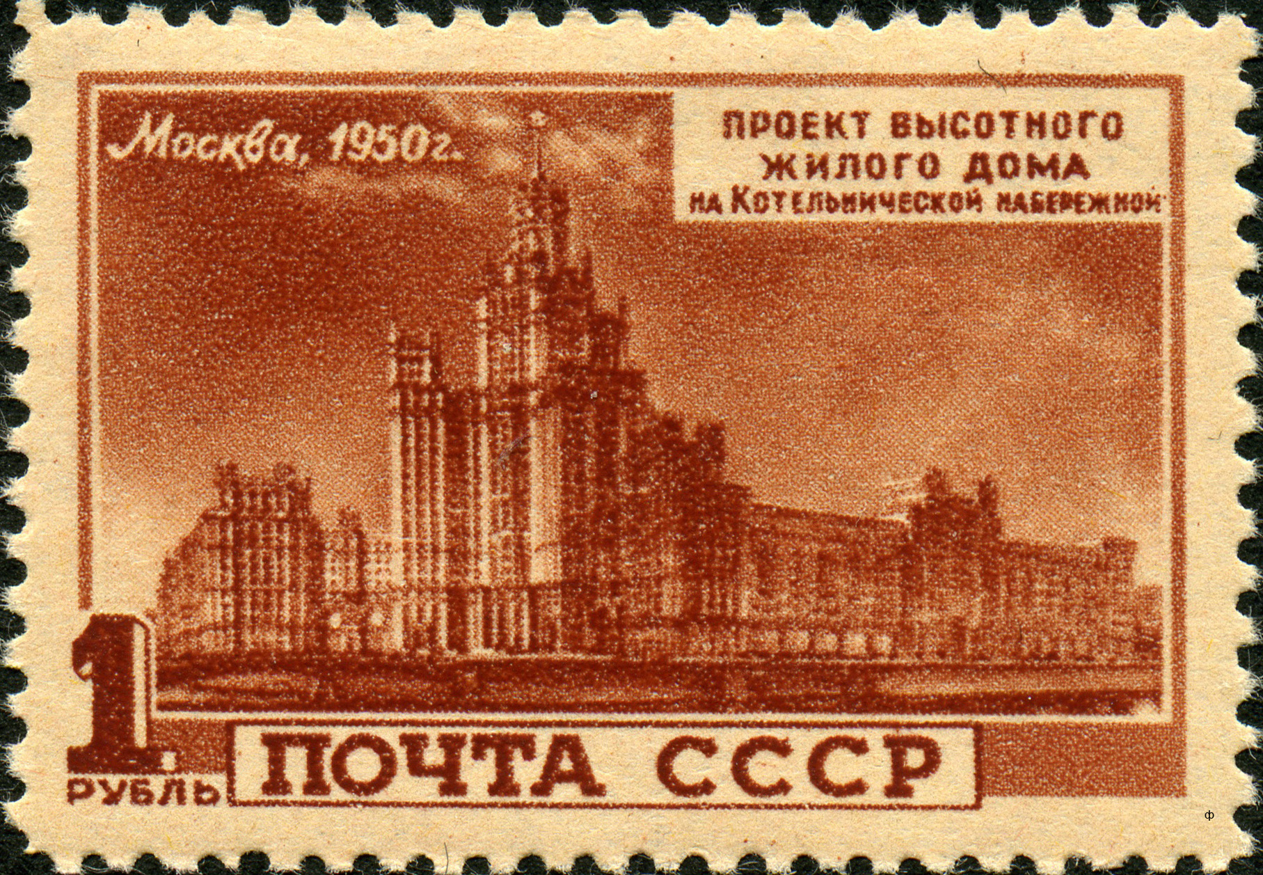 Марка СССР